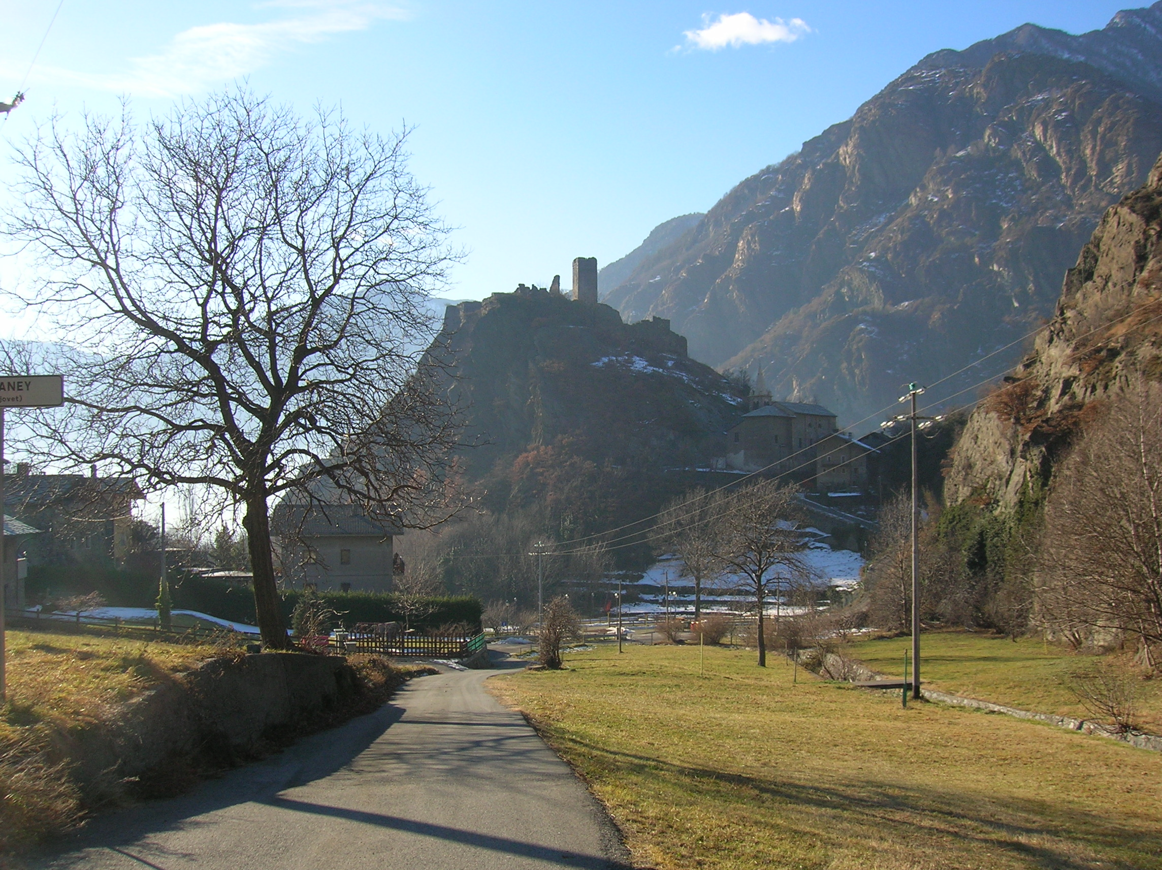 Il lato nord (nord-est) del Castello Saint-Germain e la chiesa parrocchiale di Saint-Germain visti dalla frazione Provaney, Montjovet, Valle d'Aosta, Italia.